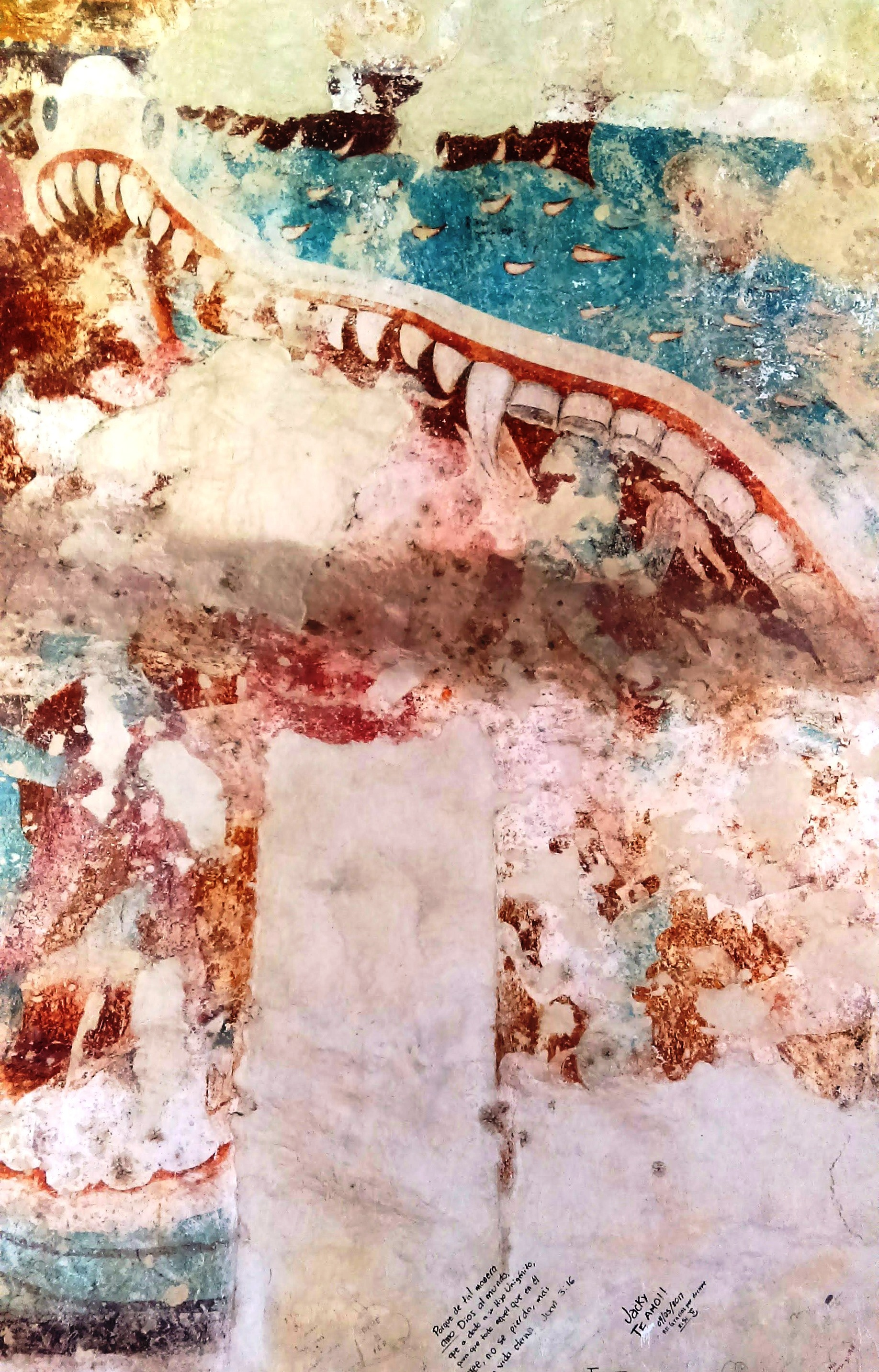 Muro norte de la Capilla Abierta del Convento de Actopan, Hidalgo, México.